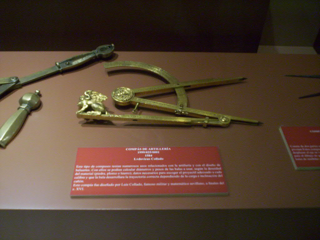 Museo Nacional de Ciencia y Tecnología (estación de Delicias, Madrid), pieza 99/25/1. Compás de artillería firmado por Luis Collado, 1584 "famoso ingeniero español del siglo XVI, con el cual se podían realizar medidas de distancias y de ángulos de inclinació,así como obtener el peso de un proyectil dependiendo del material del que está fabricado y su calibre"; según lo describe el catálogo del museo.